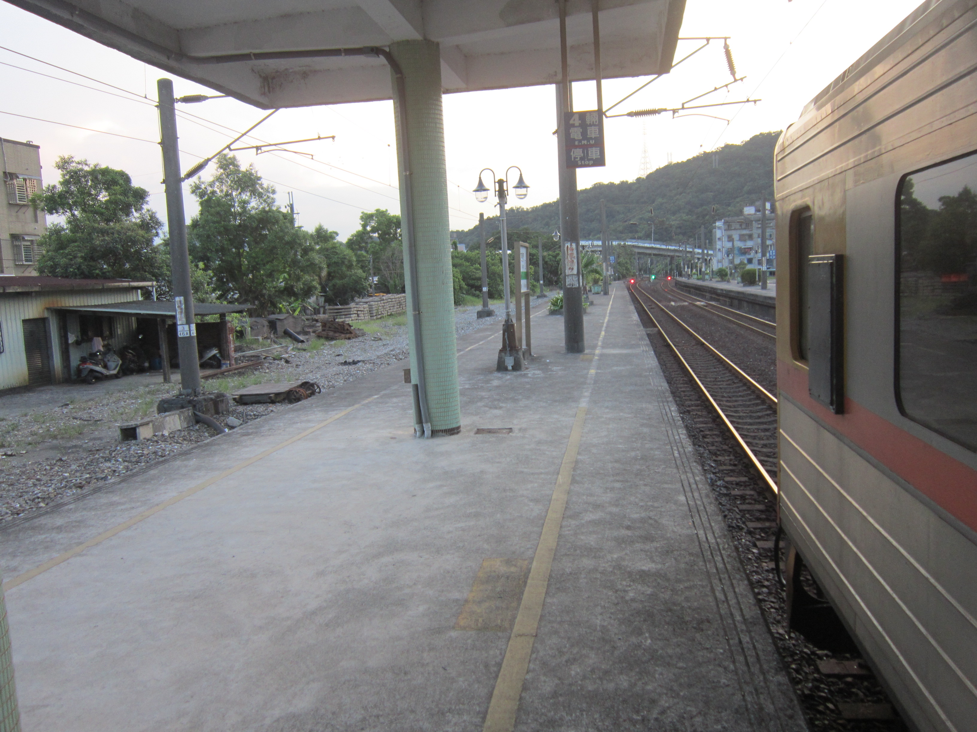 停靠在四腳亭車站的DR1000台鐵柴電客車